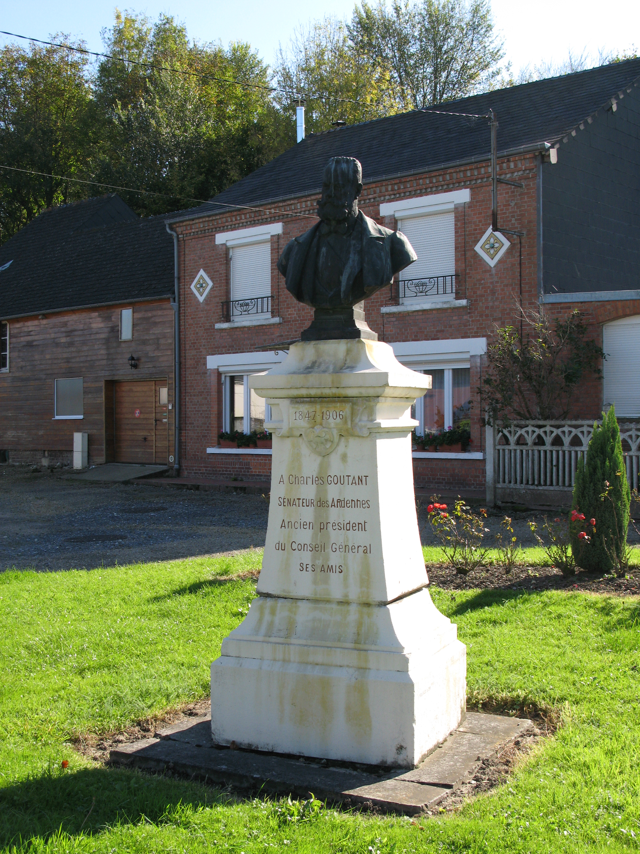 Liart (Ardennes, France) - Monument érigé à la mémoire de Charles Goutant, sur la "Place Goutant" que rejoint la Route départementale D978 (entrée dans la commune par le Sud).